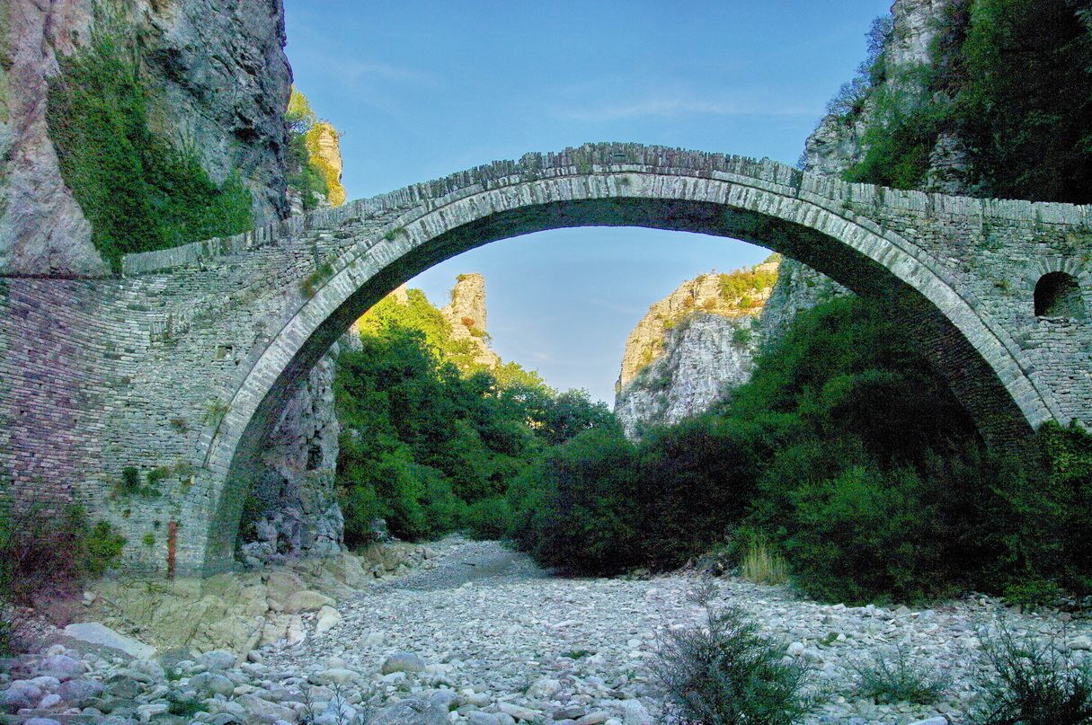 Noutsos- oder Kokkoris-Brücke Vikos-Schlucht